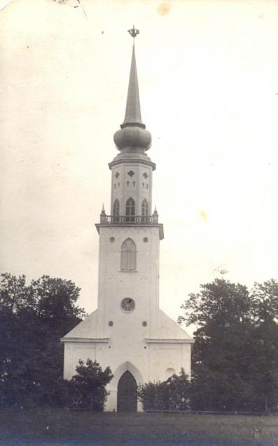 Veckalsnavas baznīca 1930.gadā